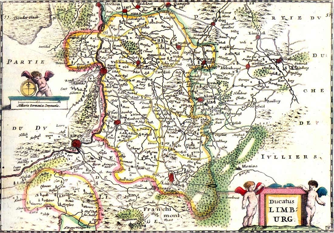 Karte des Herzogtums Limburg aus "De Vyerige Colom" 1635. Die größeren Städte (rot) sind: links Lüttich (Liége) und Maastricht Mitte: Aachen ("Akon/Aix"), ganz unten Limburg ("Limborch") rechts Jülich ("Gulick") in Richtung Köln Bearbeitung: Ed Stevenhagen in der niederländischen WP, obige Städtebeschreibung 81.5.239.40 10:39, 14 July 2007 (UTC) (Benutzer:Geof) Bereitstellung für Commons: Marie-Luise Carl